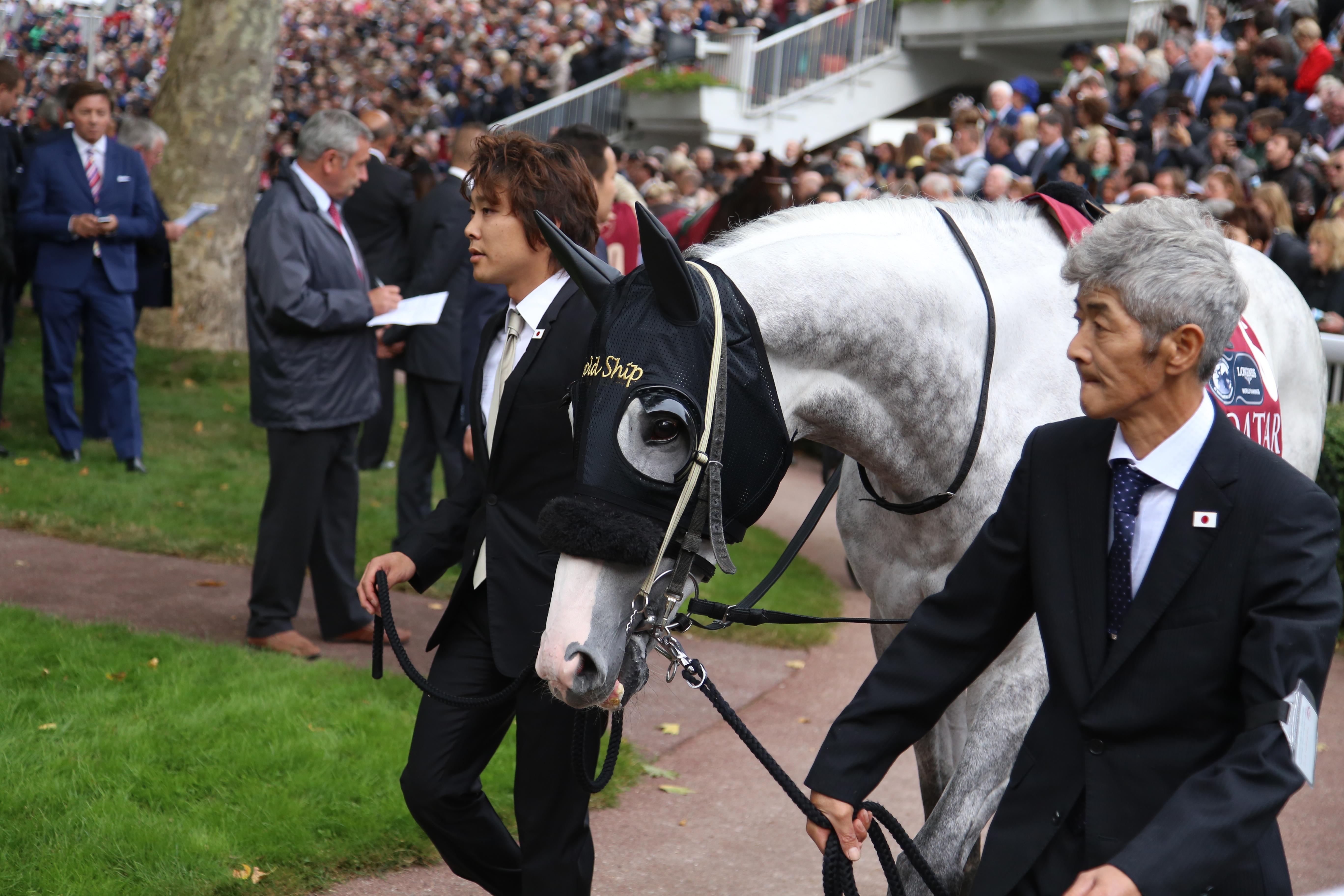 第93回凱旋門賞パドックでのゴールドシップ